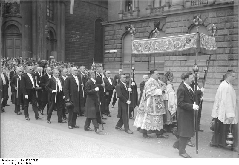 Die feierliche Fronleichnam-Prozession vor der Hedwigskirche in Berlin! Anwesend waren der ehemalige Reichskanzler Dr. Wirth, Reichspostminister Schätzel und der frühere preussische Ministerpräsident Stegerwald, sowie hohe kirchliche Würdenträger. Die feierliche Fronleichnam-Prozession bewegt sich über den Opernplatz vor der Hedwigskirche in Berlin. Im Hintergrund die Hedwigskirche.